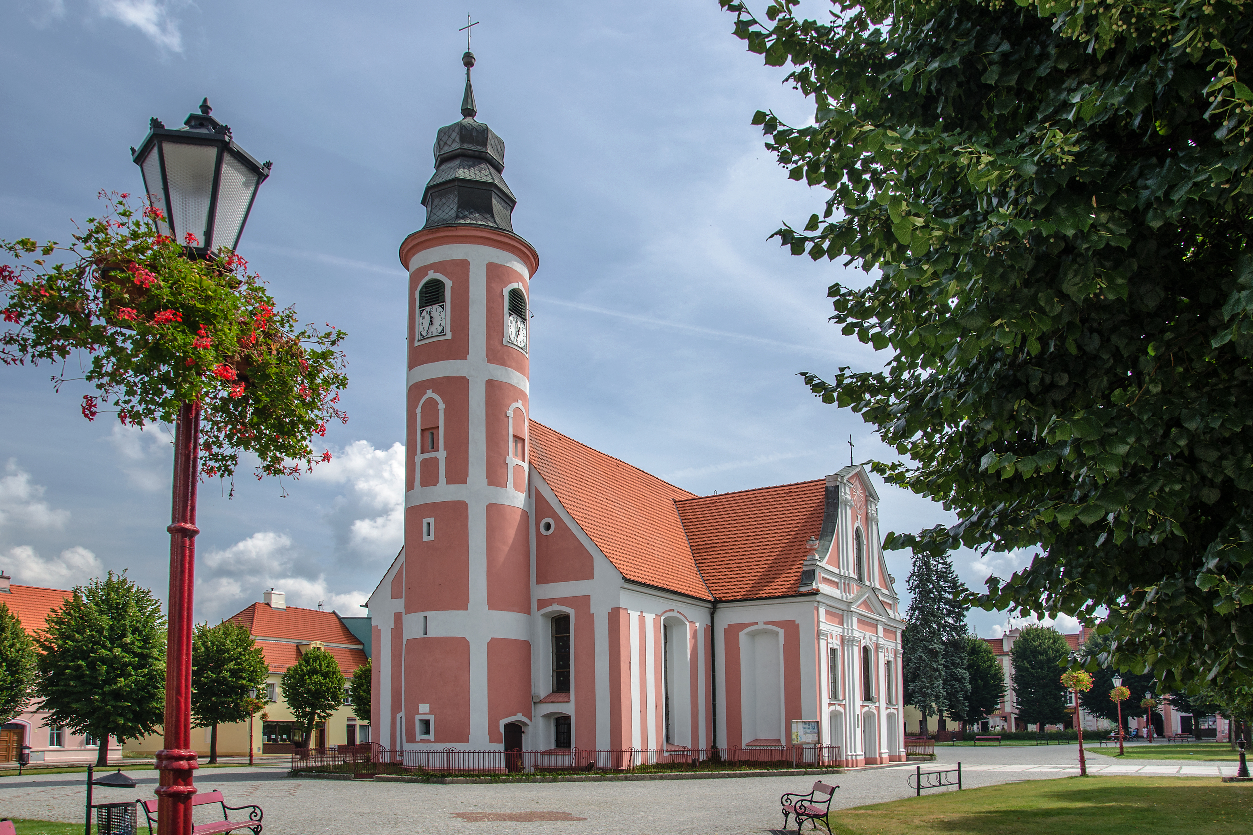 Chocianów, kościół pom. p.w. św. Józefa Oblubieńca (dec. p.w. Najśw. Serca Pana Jezusa), 1680, 1865